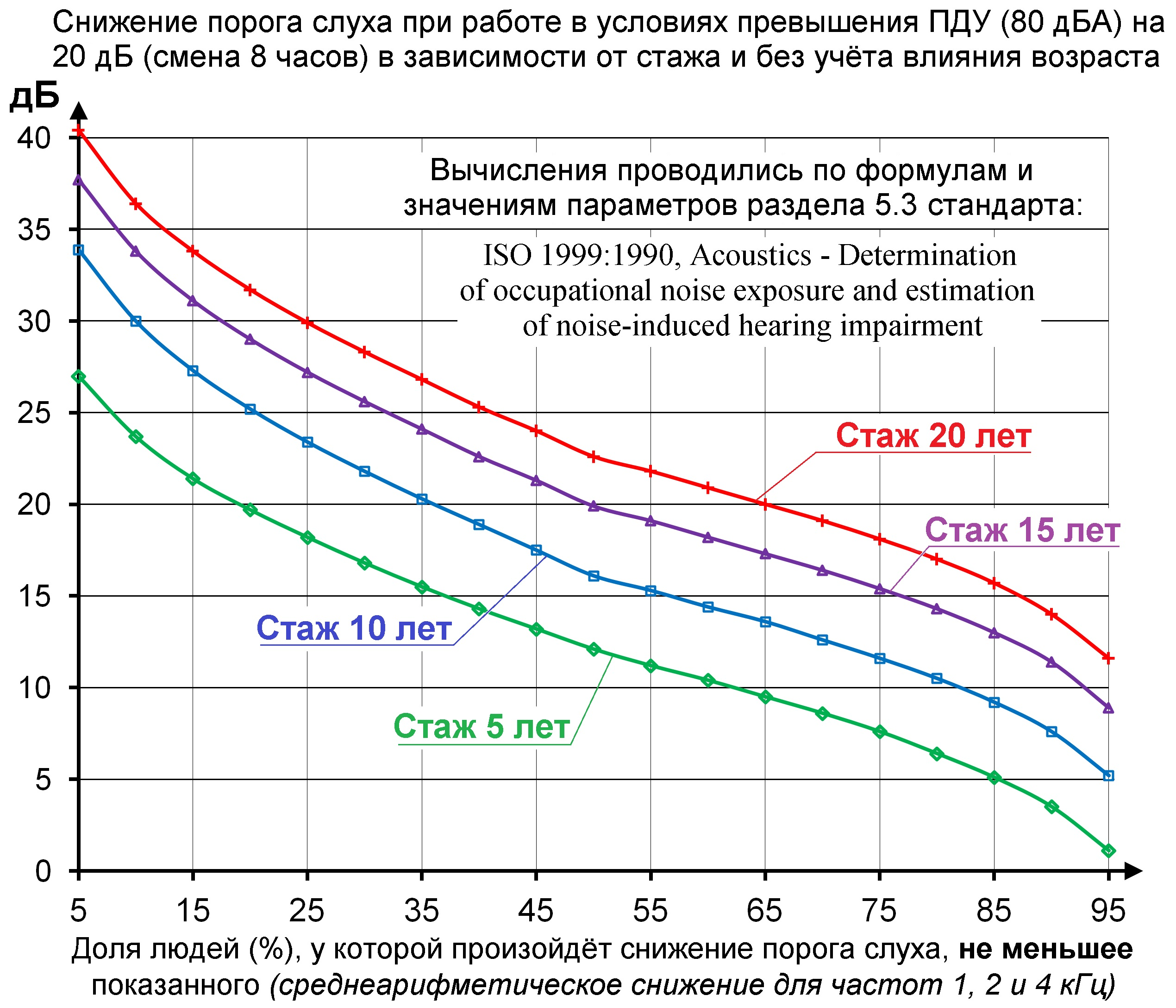 Графики показывают, какое снижение порога слуха (среднеарифметическое значение для частот 1, 2 и 4 кГц) может произойти у людей, работающих в условиях превышения предельно-допустимого уровня (ПДУ = 80 дБА в РФ) на 20 дБ в течение 5, 10, 15 и 20 лет (8-часовая смена) без учёта влияния возрастного ухудшения слуха и использования СИЗ. Видно, что отличия в "индивидуальной живучести" приводят к тому, что в одинаковых условиях у части людей снижение очень значительное, а у части - небольшое (при стаже 10 лет у ~5% рабочих снижение меньше 11 дБ, а у 5% - больше 33 дБ). В сочетании с непредсказуемой эффективностью средств индивидуальной защиты (СИЗ) органа слуха это показывает, что для предотвращения ухудшения здоровья у всех рабочих должны проводиться периодические медосмотры с аудиометрией.